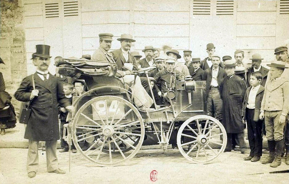 Premier volant automobile, concurrent n°24 de Paris-Rouen le 22 juillet 1894 - Alfred Vacheron de Monthermé (08, gazoline), Voitures sans chevaux. Concours organisé par le Petit Journal, 22 juillet 1894, coll. R.Girard BNF/Gallica